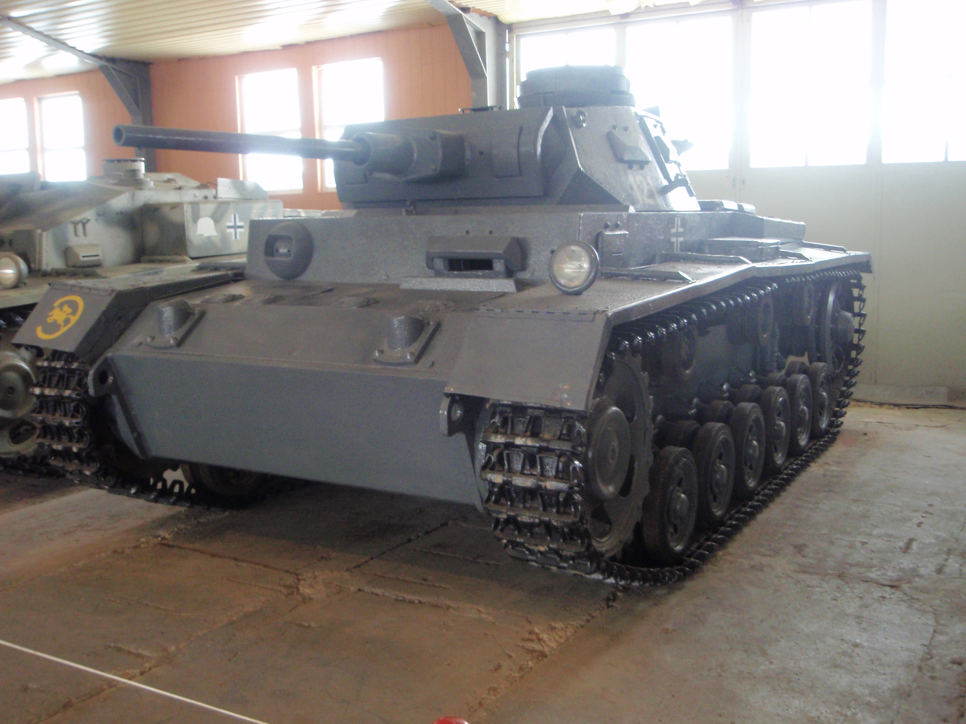 Немецкий средний танк Pz.III в Кубинке